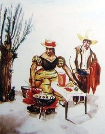 Mujer mulata o negra preparando buñuelos (o picarones) en la Lima del siglo XIX. Hasta no confirmar título de la acuarela no me atrevo a asegurar que es lo que prepara la cocinera.